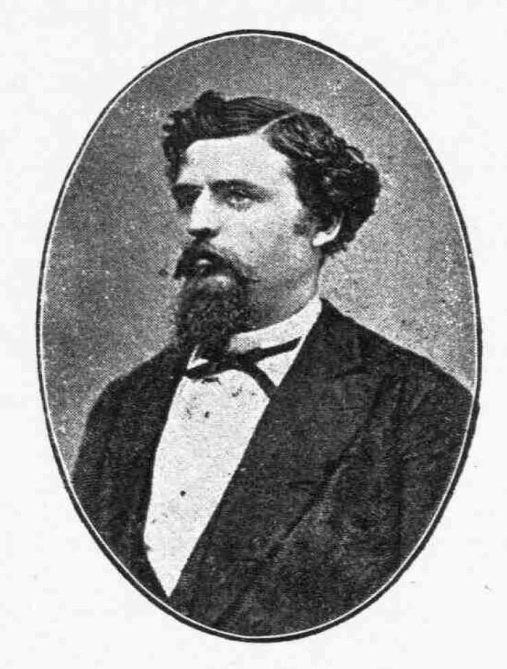 griechischer Wohltäter und Stifter, 19. Jahrhundert